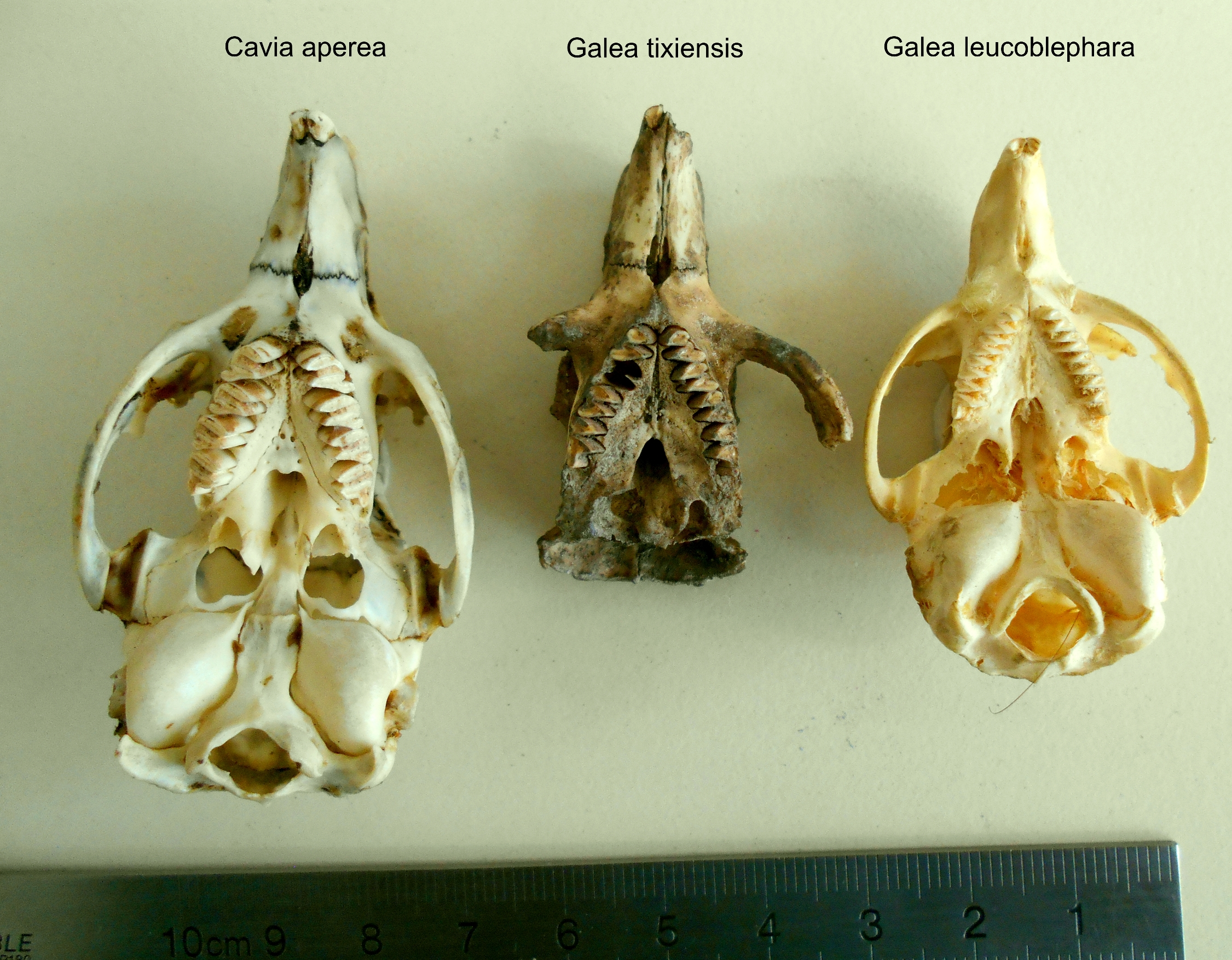 Cráneo de Galea tixiensis comparada con otras dos especies de roedores cávidos.